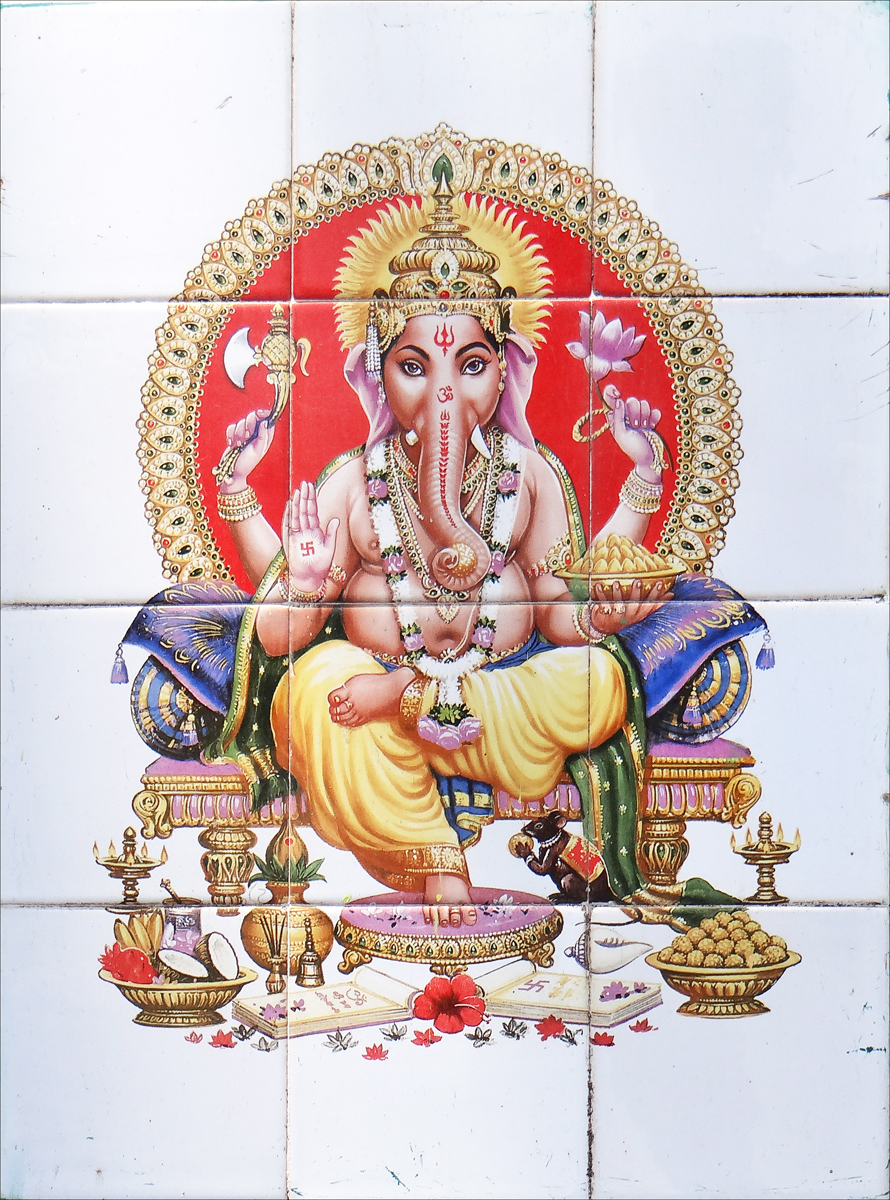 Représentation de Ganesh (Ganesha, Ganapati) sur le mur d'enceinte du temple recouvert de carreaux de céramique